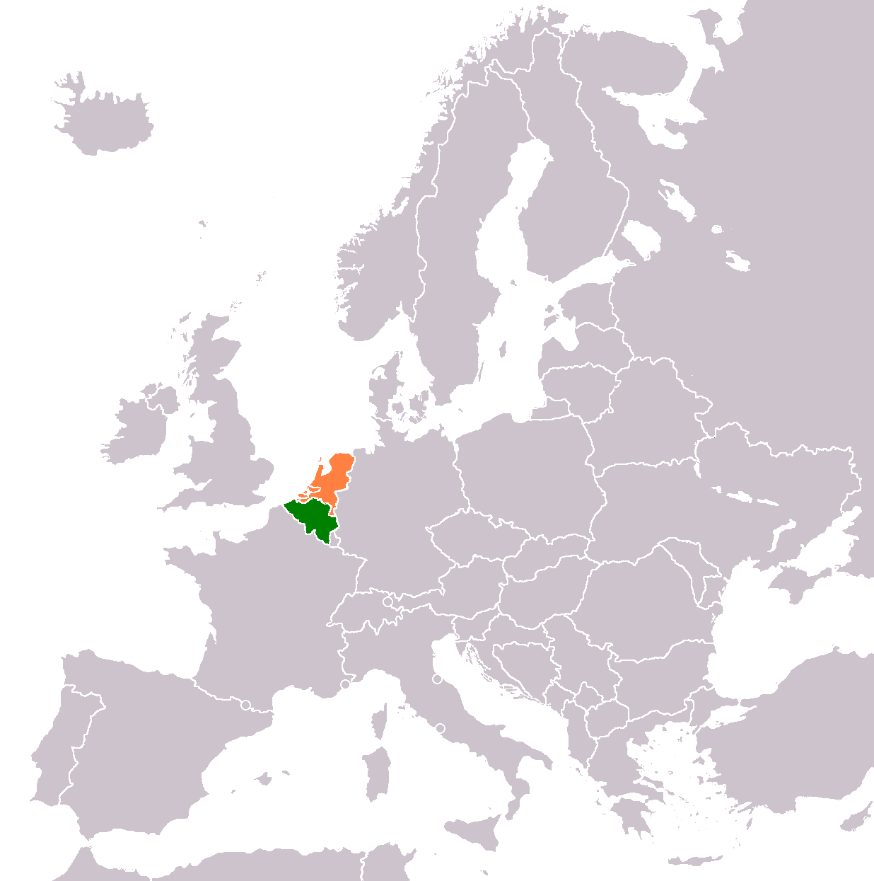 Belgium-Netherlands locator map.